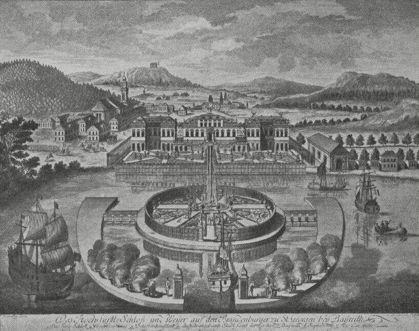 Kupferstich mit einer Ansicht des Ordensschloss St. Georgen, heute Teil von Bayreuth --- Seite 31, Abbildung 34, Untertitel: St. Georgen. Altes Schloss. Ansicht vom See aus. Kupferstich von J. A. Delsenbach nach einer Zeichnung des Hofarchitekten Paul Decker.